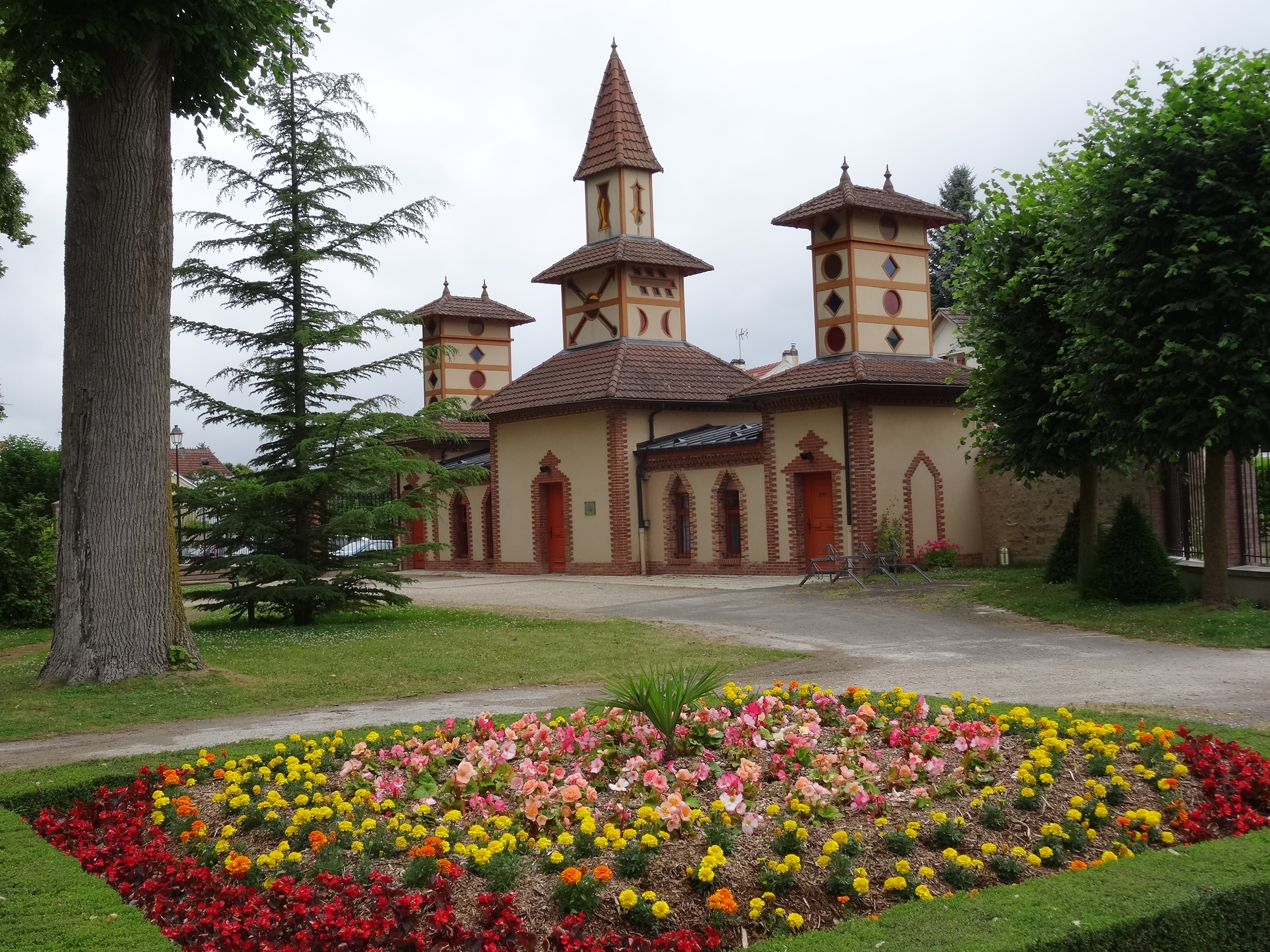 Parc de la Sauvagerie, Varennes-sur-Seine. (Seine-et-Marne, région Île-de-France).